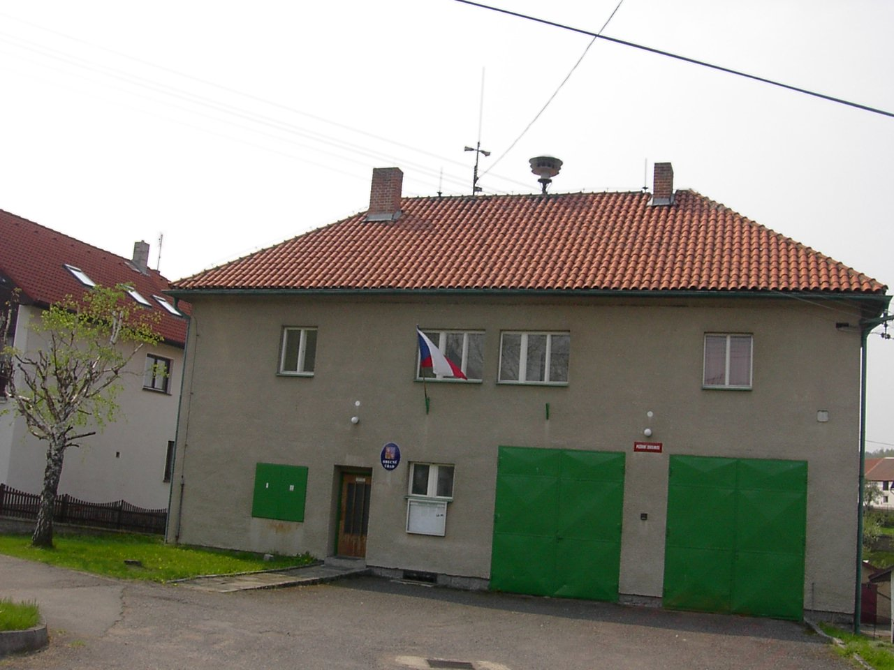 Obecní úřad v Dalekých Dušníkách.